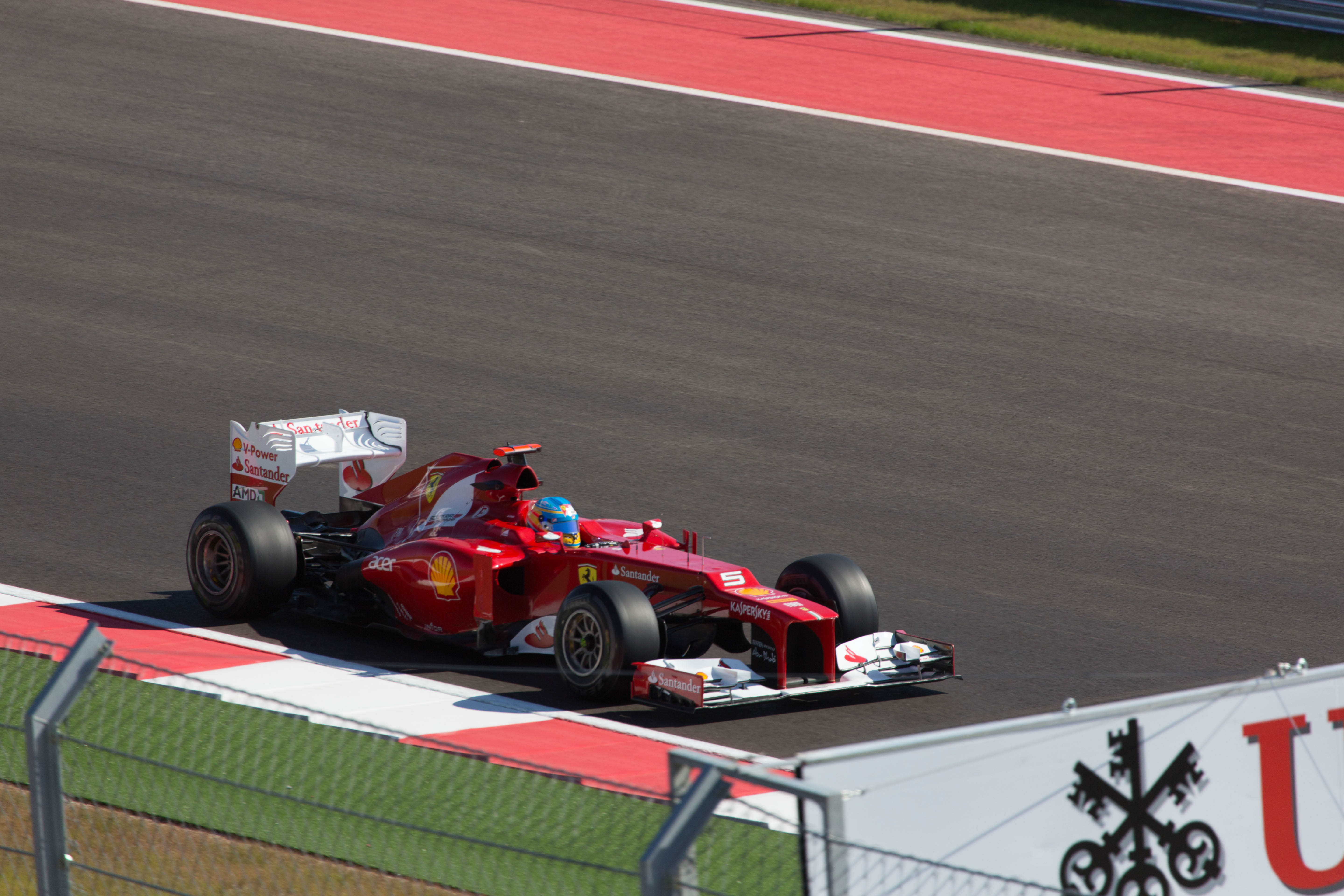 Fernando Alonso lors du Grand Prix des USA 2012 sur Ferrari F2012.